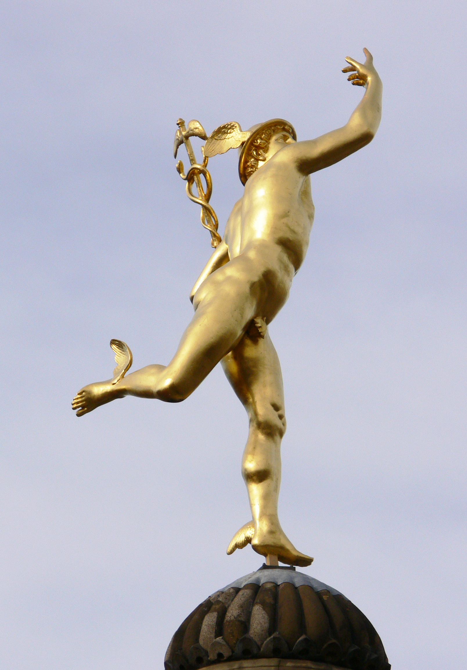 Stuttgart, Merkur (19.Jahrhundert). Der Merkur blickt von der Merkusäule der "Alten Kanzlei" in Richtung Schlossplatz.